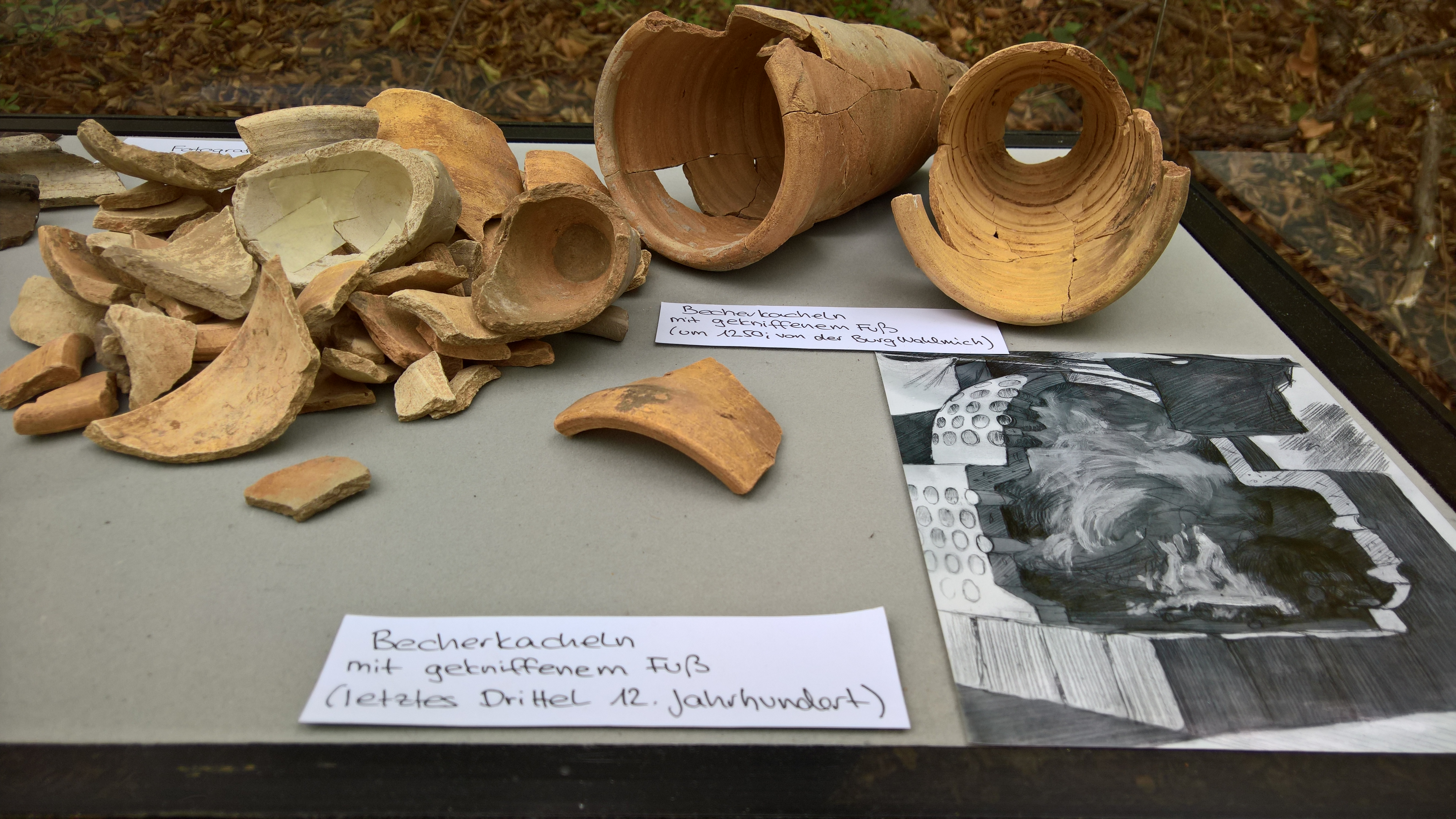 Ausgrabungsergebnisse zum Tag des Denkmals und Grabungsfest auf dem Burgbereich: Becherkachelfragmente und 2 fast komplett restaurierte Becherkacheln der Burg Wahlmich bei Waldaschaff zum Vergleich.